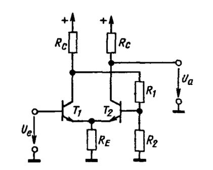 Эмиттерно-связанный триггер Шмитта.